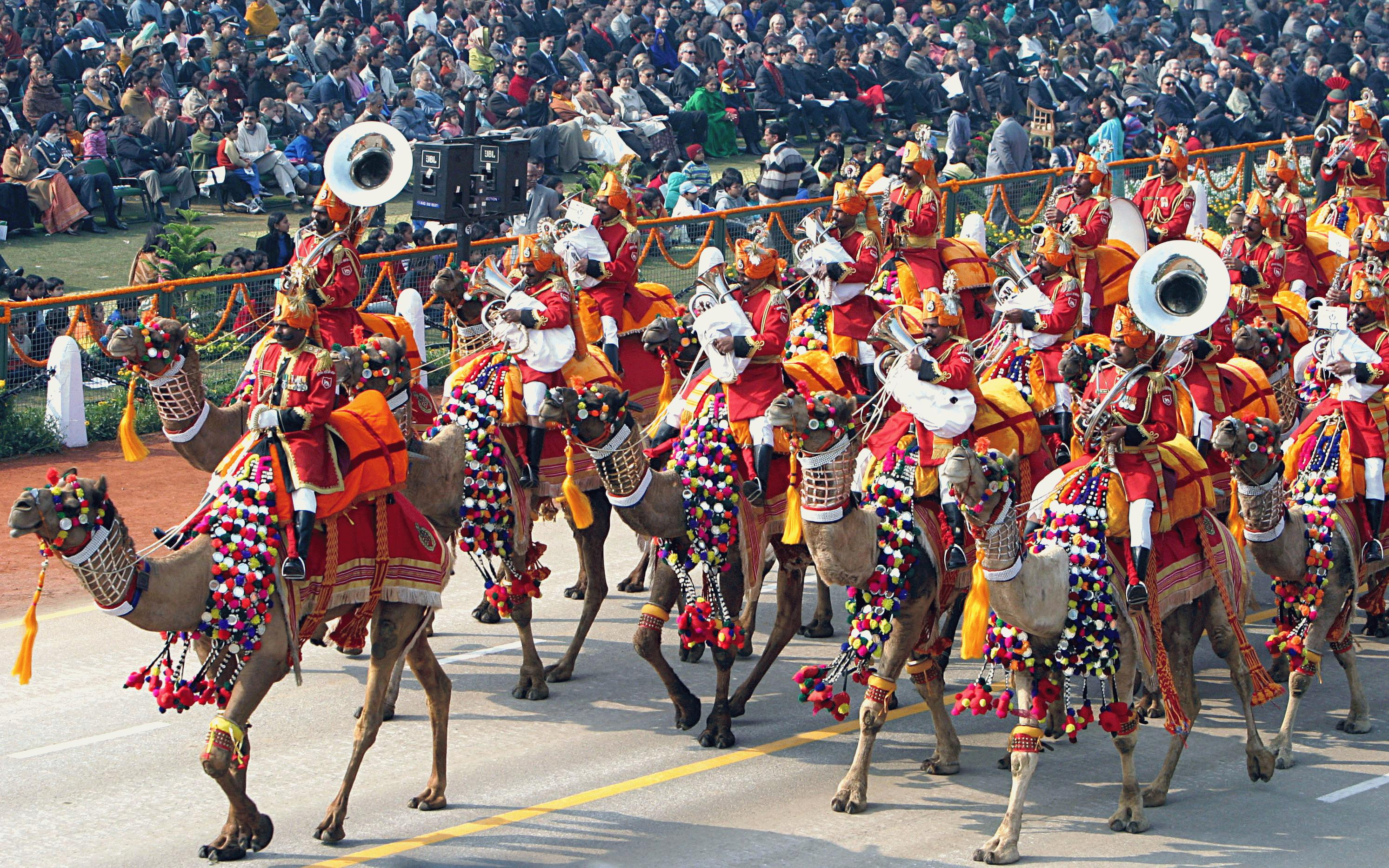 Nova Délhi (Índia) - Desfile do Dia da República indiana, na Rajpath.(foto:Antônio Milena)